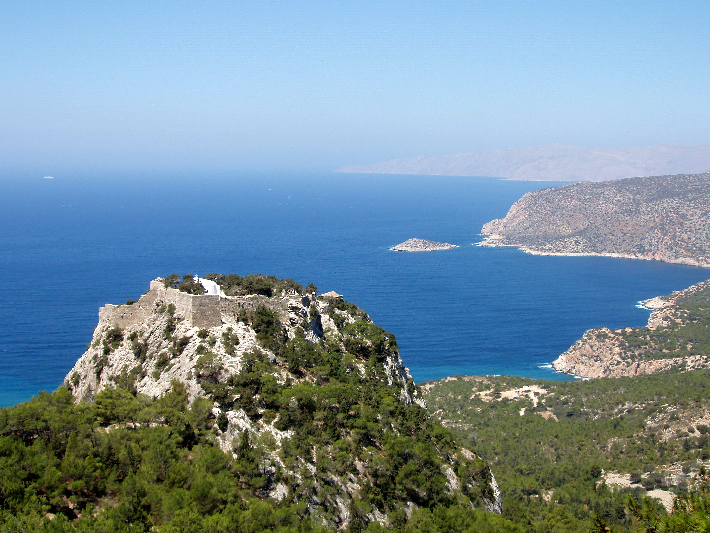 Fortezza di Monolithos, Rodi, Grecia. Di origine medievale, arroccata sul monte Akramitis, sul versante ovest dell'isola di Rodi.